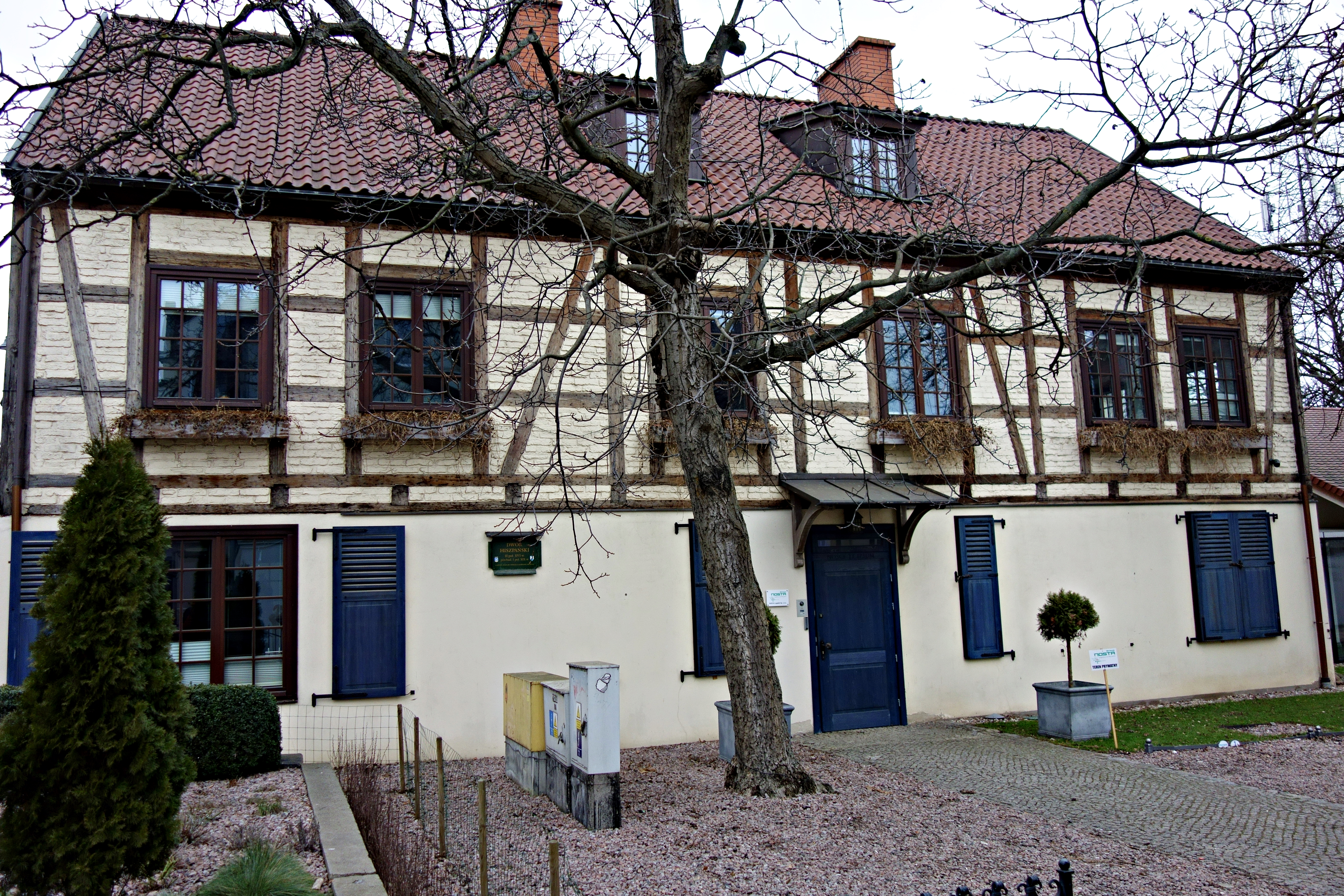 Sopot, Dwór Hiszpański w Sopocie